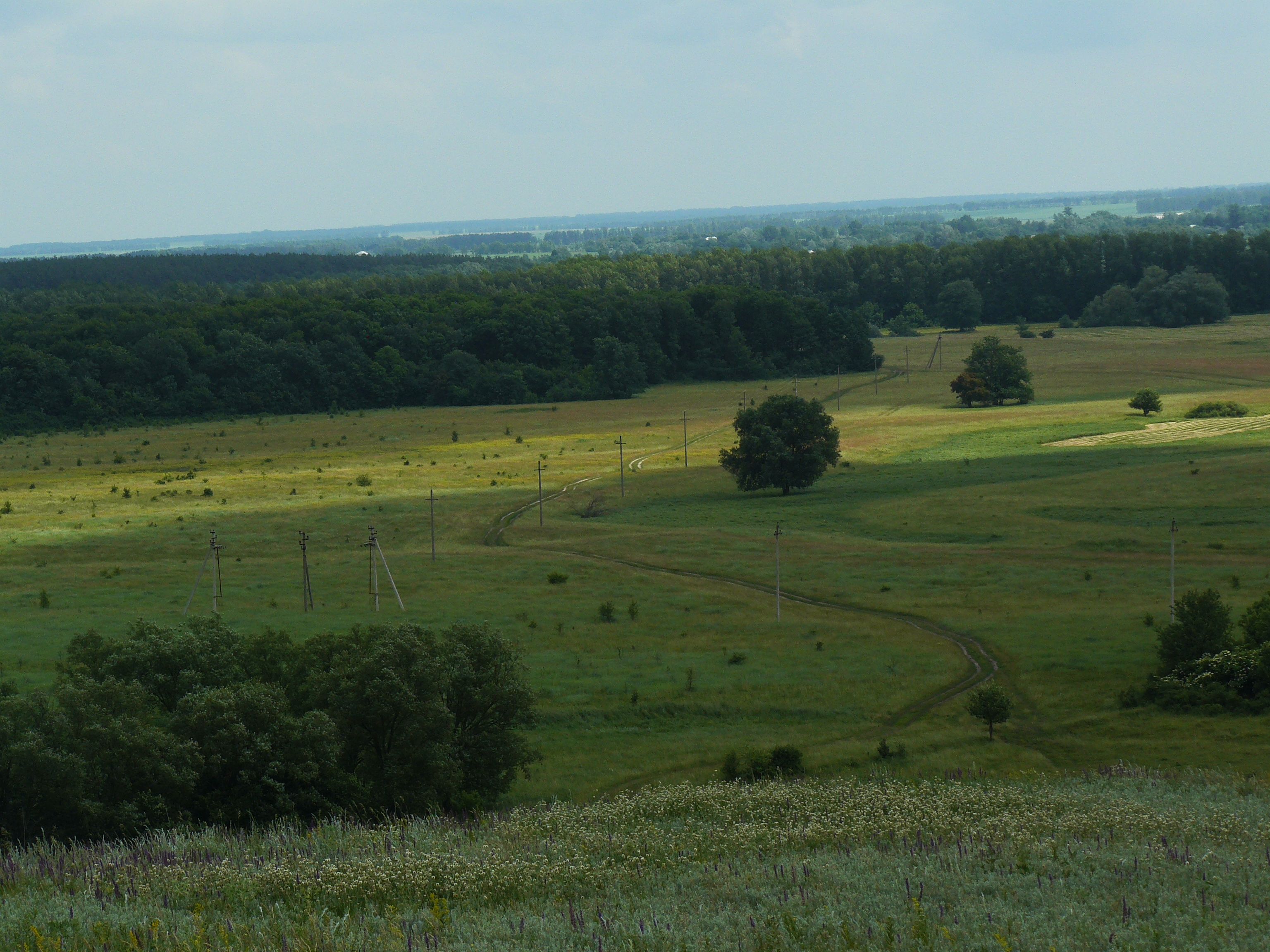 Грайворонский район-1